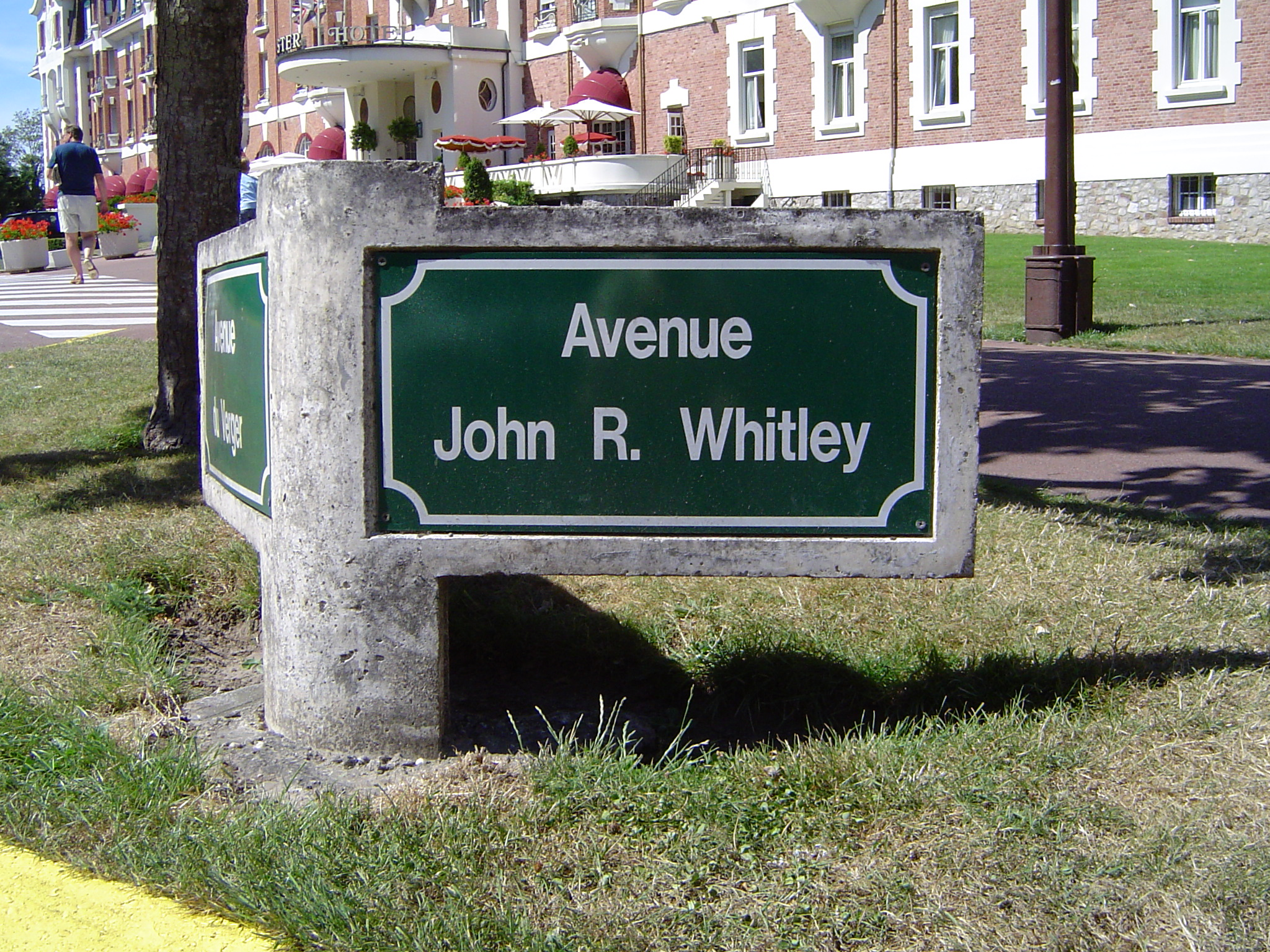 Photos de plaques de rues prises dans la commune du Touquet-Paris-Plage